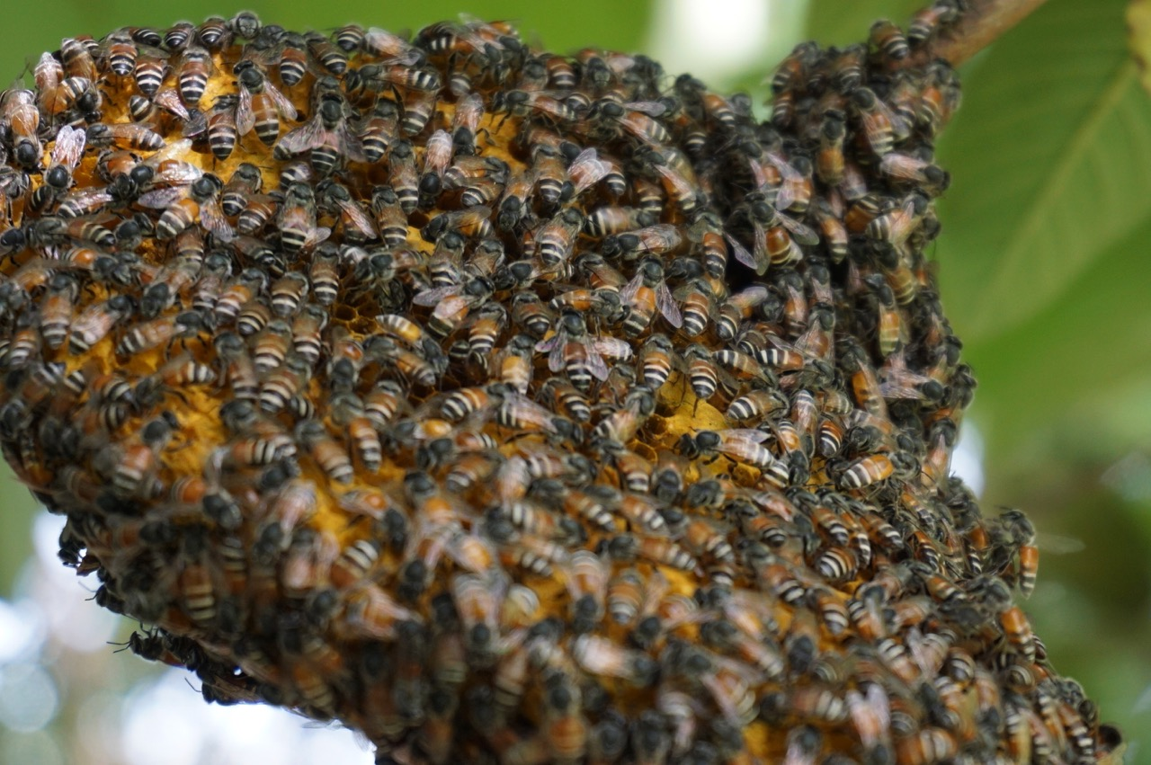 Một tổ ong trên cành cây, Q. Cẩm Lệ, TP. Đà Nẵng